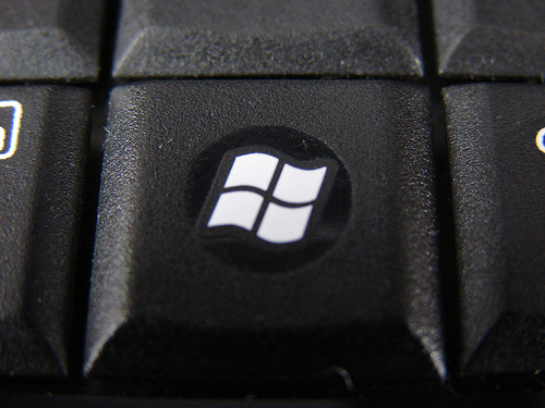 Aquest és el botó de Windows